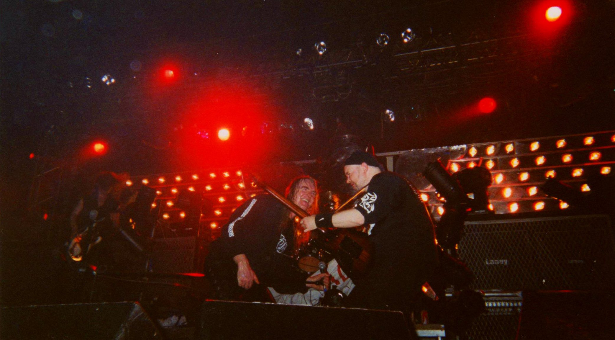 Saxon à l'Elysée Montmartre, Paris, le 24 janvier 2003